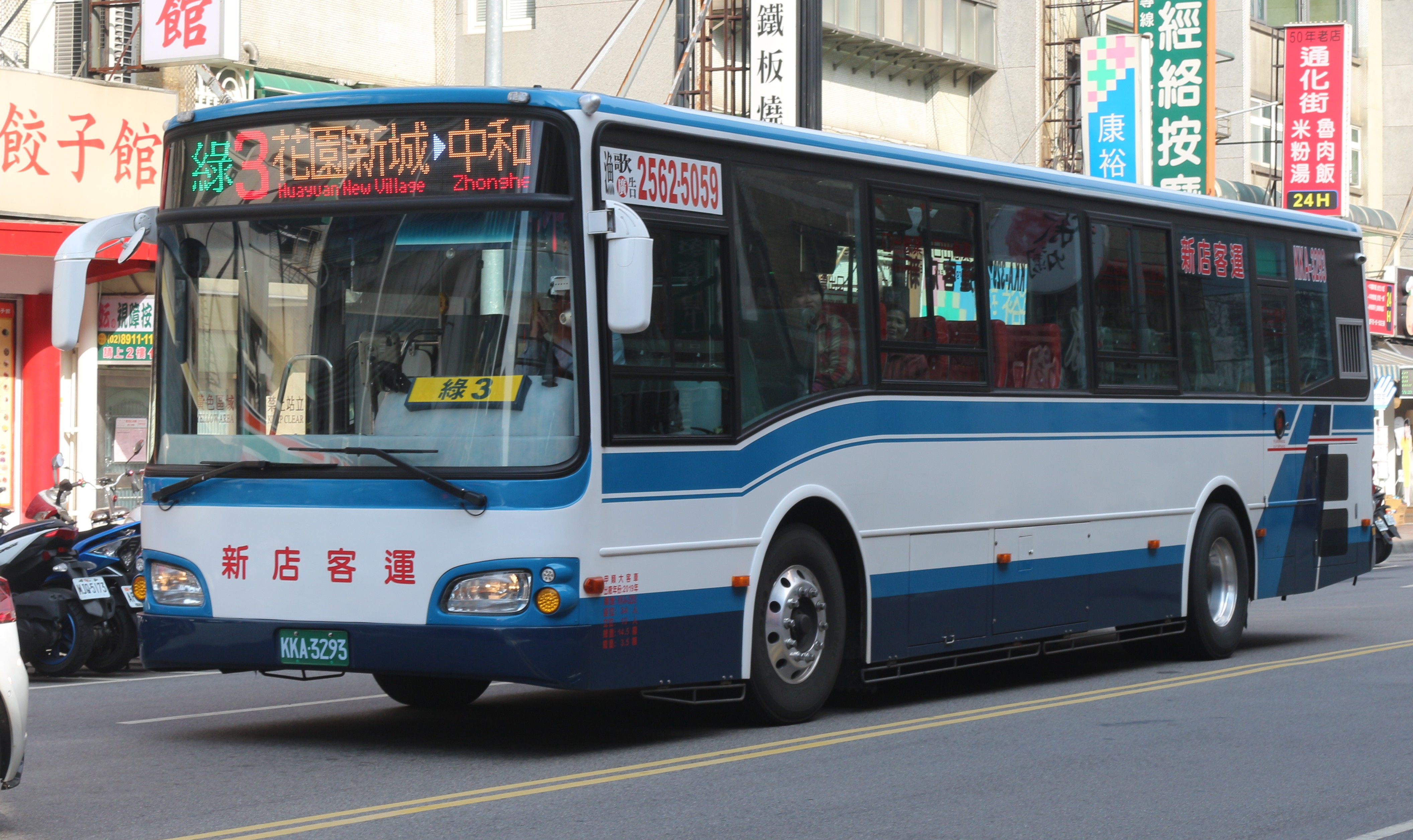 中文（台灣）: 新店客運2019年日野RK8JRVA-KJF大客車KKA-3293，行駛綠3線。